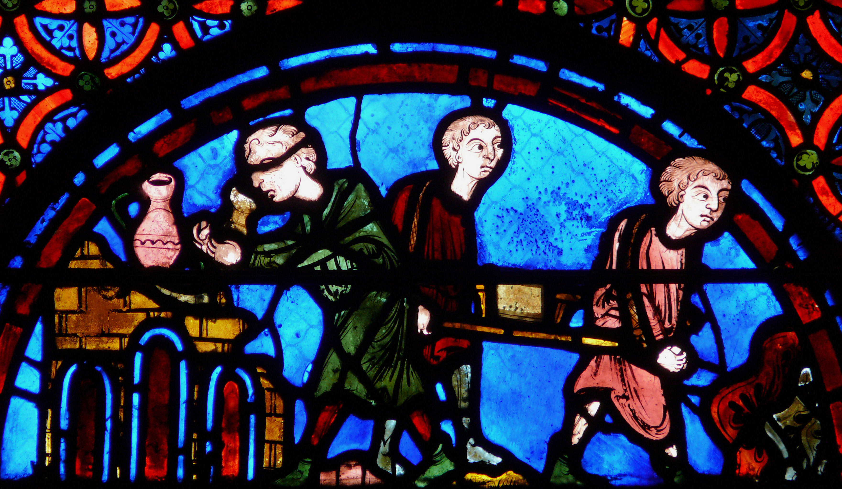 Bourges - Cathédrale - Déambulatoire - Parabole de Lazare et du mauvais riche